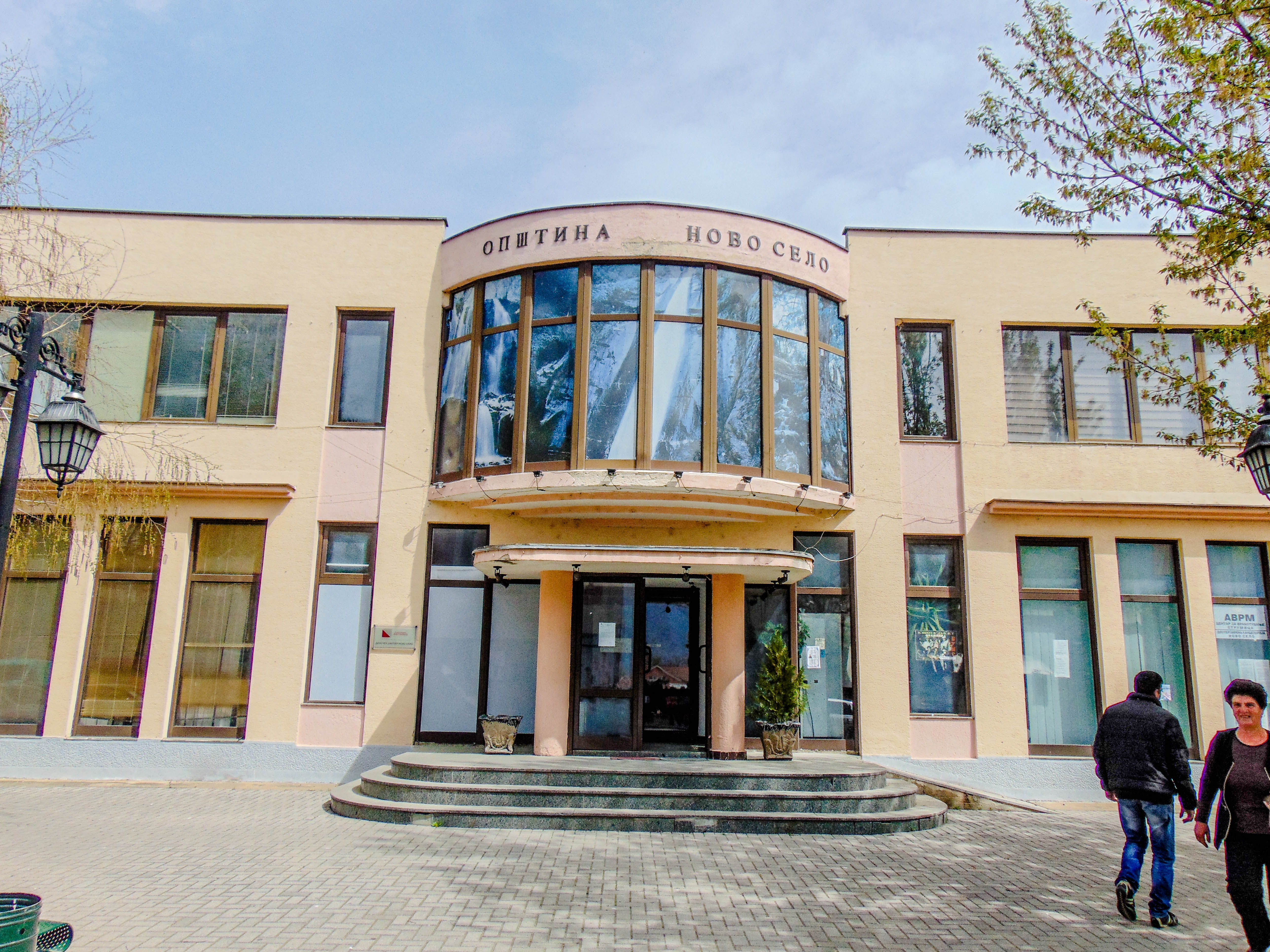 Зградата на Општина Ново Село